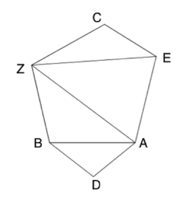 Figura corresponent al teorema 47 del llibre de Les Data d'Euclides